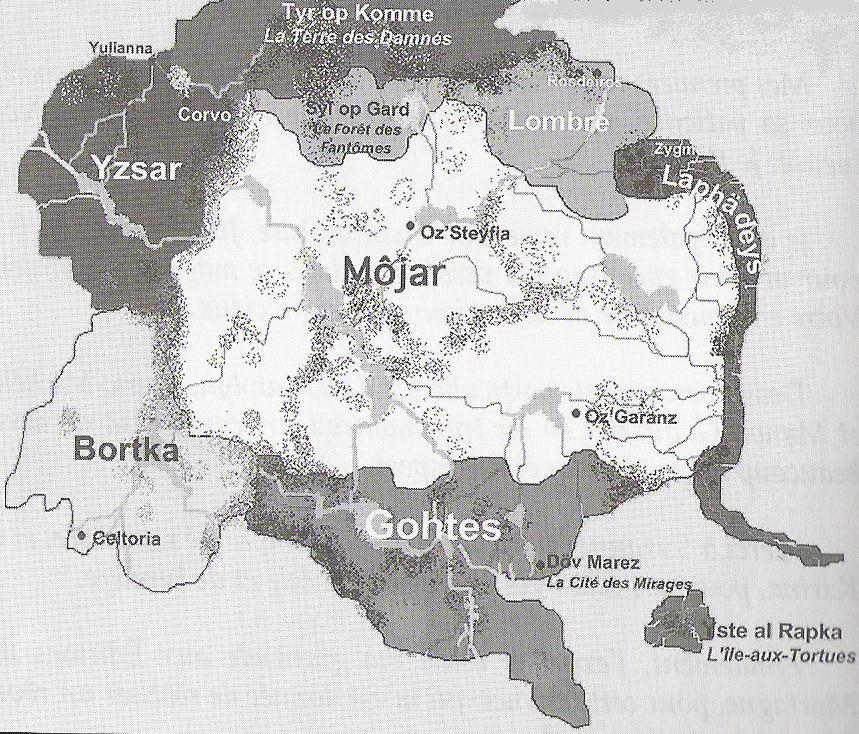 La carte du continent d'Anastavar